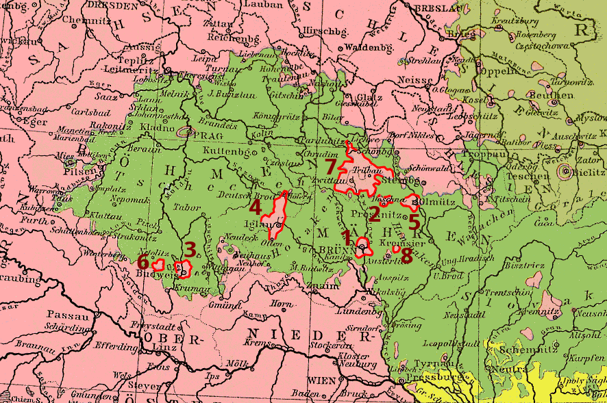 Výřez z národnostní mapy střední Evropy r. 1880 s vyznačením německých jazykových ostrovů v českých zemích